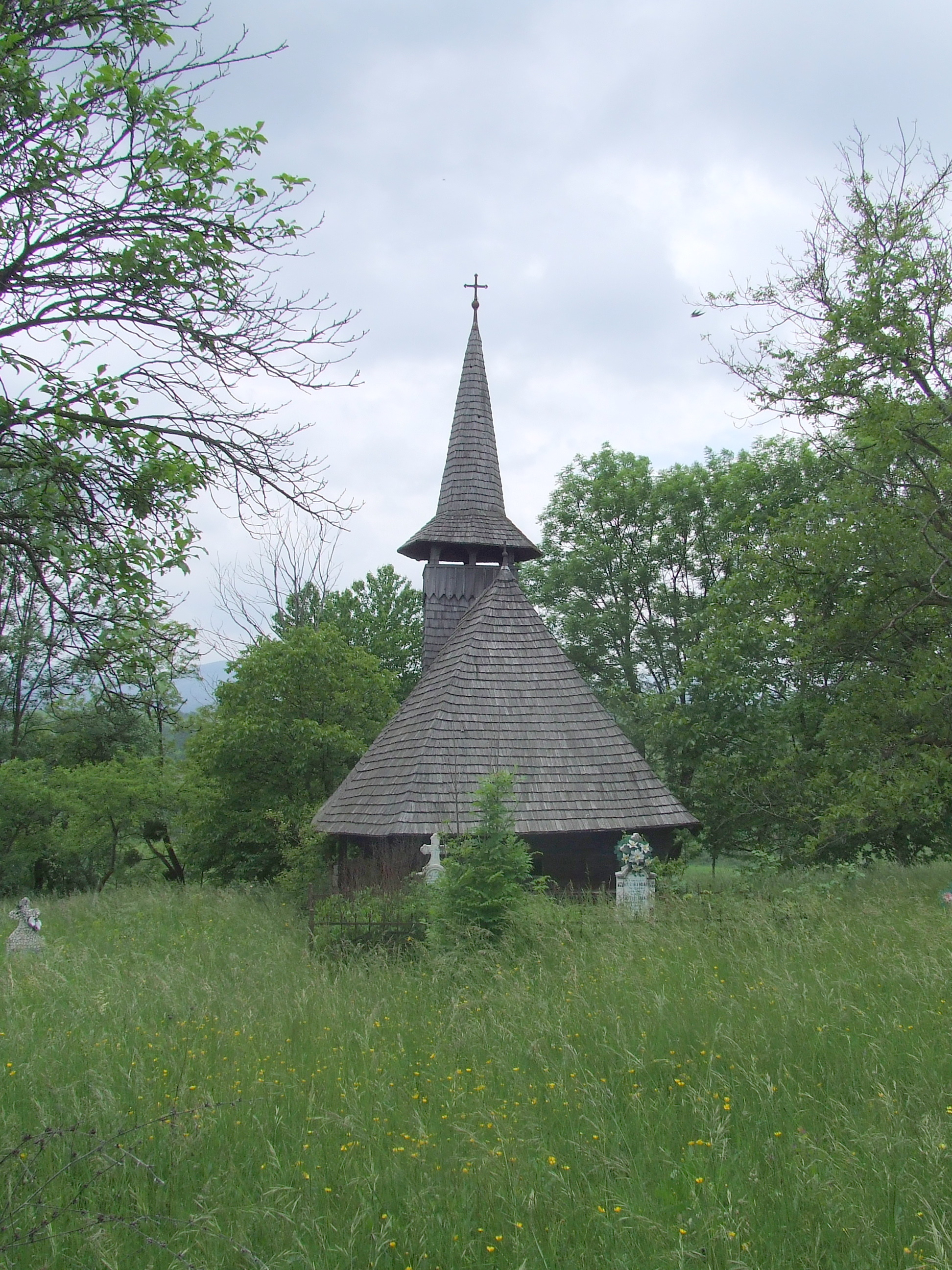 Biserica de lemn din Valea Crişului, judeţul Bihor. Imagine de ansamblu.